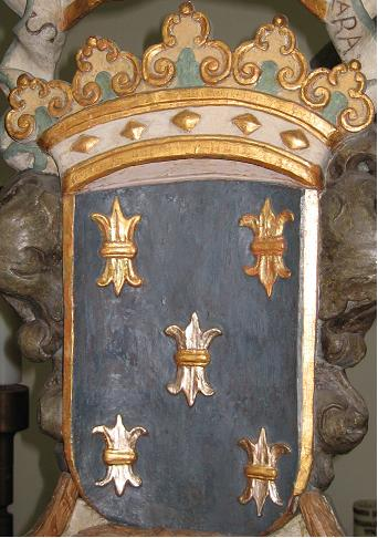 Wappen von Herzog Ekbert I. geb. um 756, gest. 811 (Ehemann der Hl. Ida von Herzfeld) . Bild von seinem Grabe in der St. Ida Kirche in Herzfeld